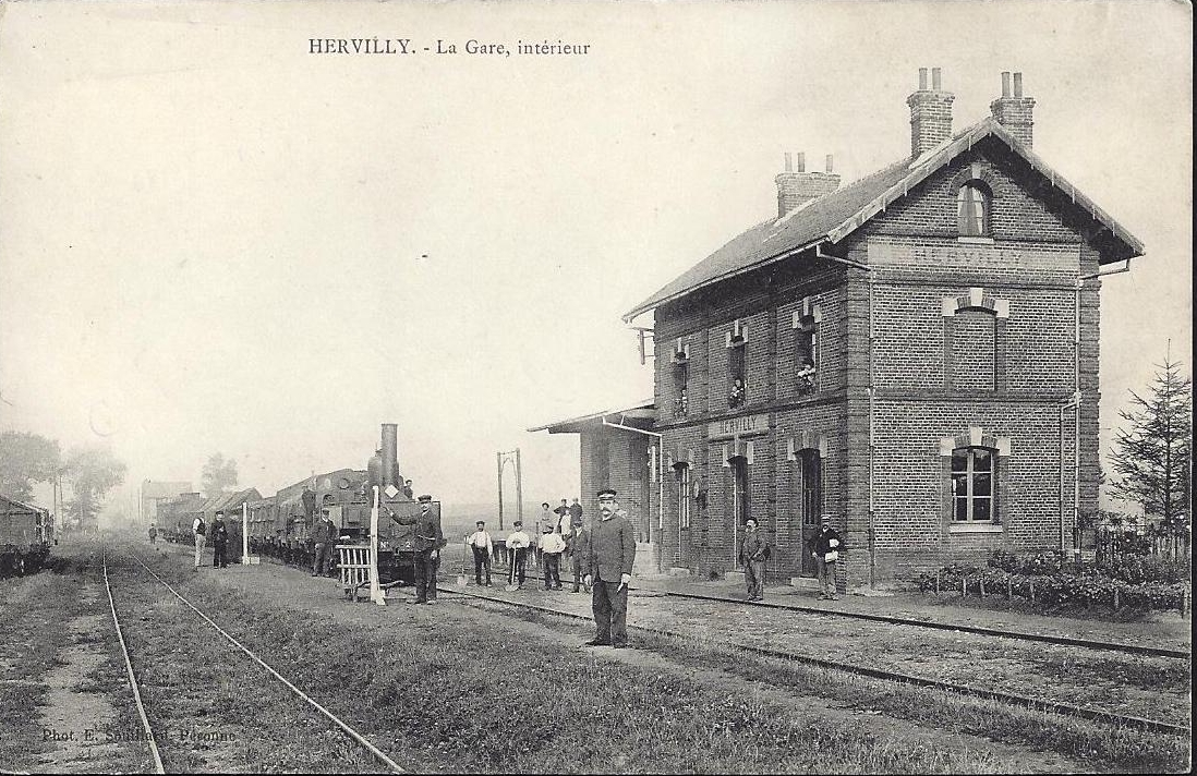 La gare d'Hervilly-Montigny avant 1914.